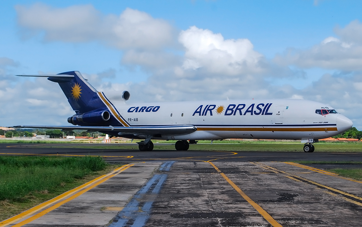 Voo Diário para Aeroporto de Teresina Senador Petrônio Portella Vindo de Aeroporto Internacional de Salvador - Dep. Luís Eduardo Magalhães